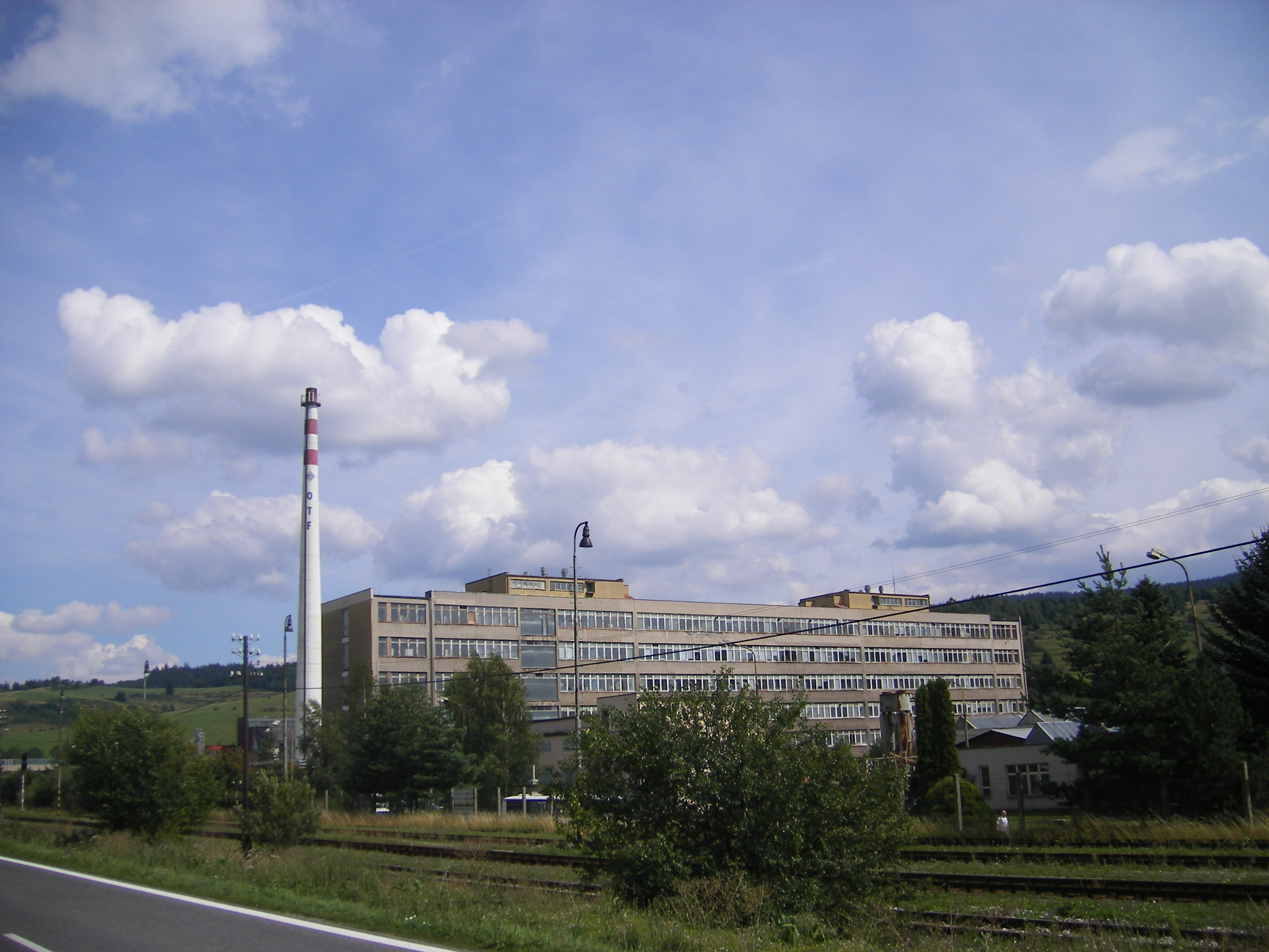 Nižná (okres Tvrdošín), OTF television factory